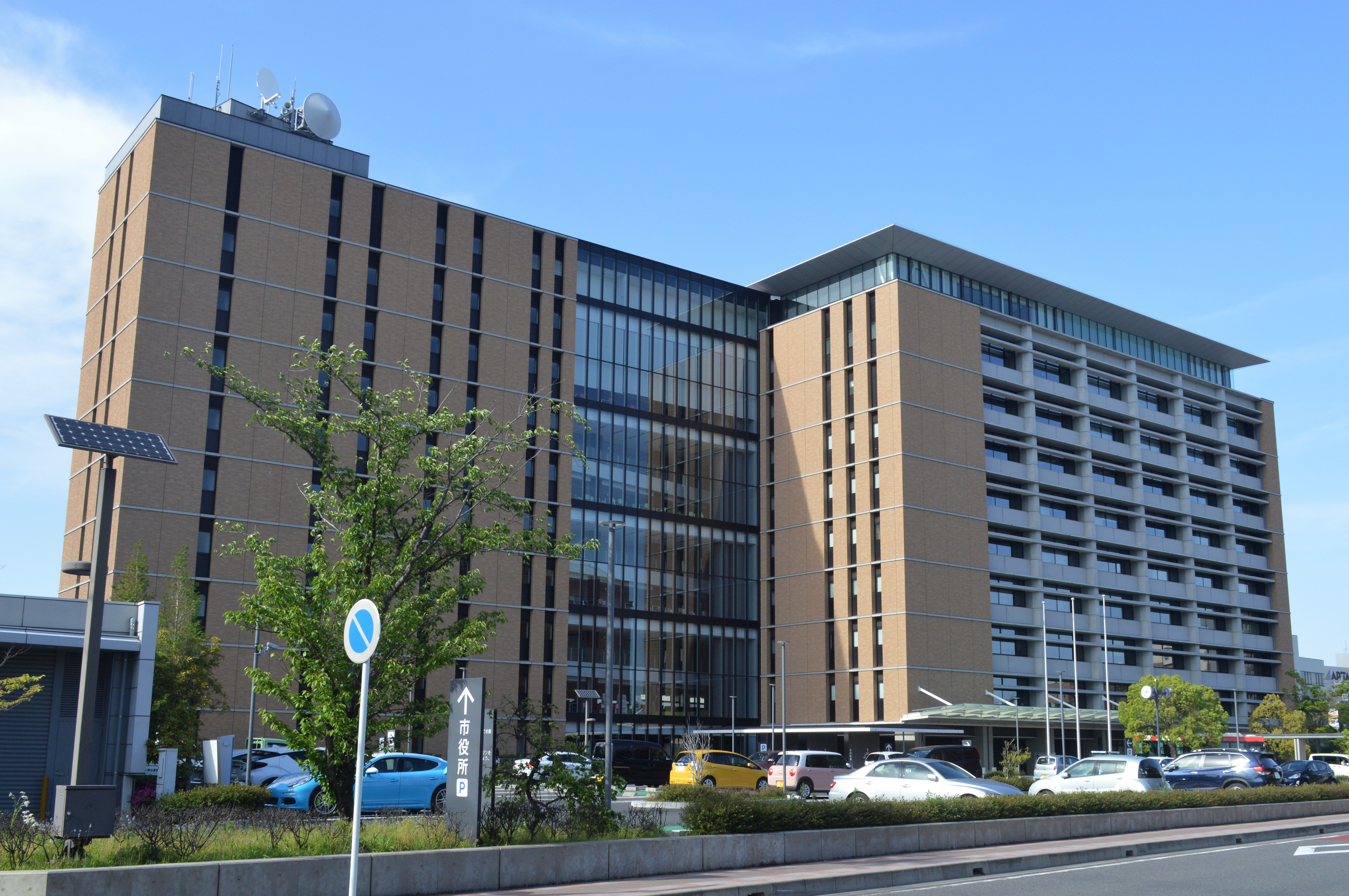 愛知県刈谷市の刈谷市役所。